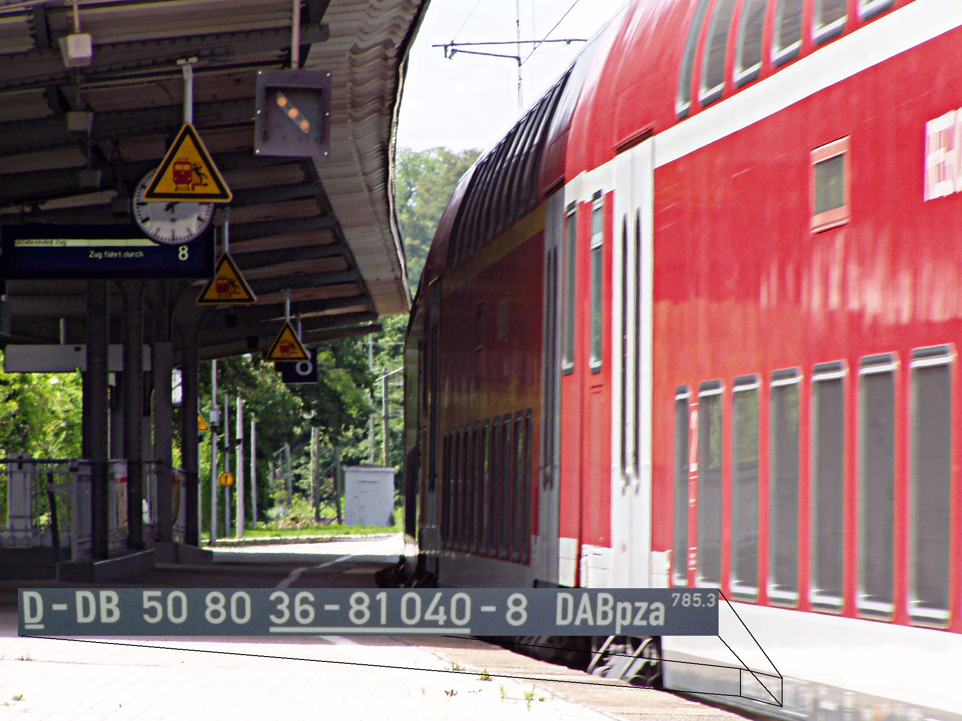 DABpza mit markierter UIC-Wagenbeschriftung